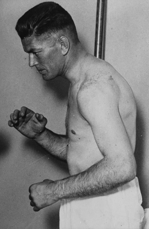 Durch Sport zum Millionär! Der amerikanische Exboxweltmeister Gene Tunney, der, freiwillig auf der Höhe seines Ruhmes zurückgetreten ist, versteuert ein jährliches Einkommen von einer Million Dollar.